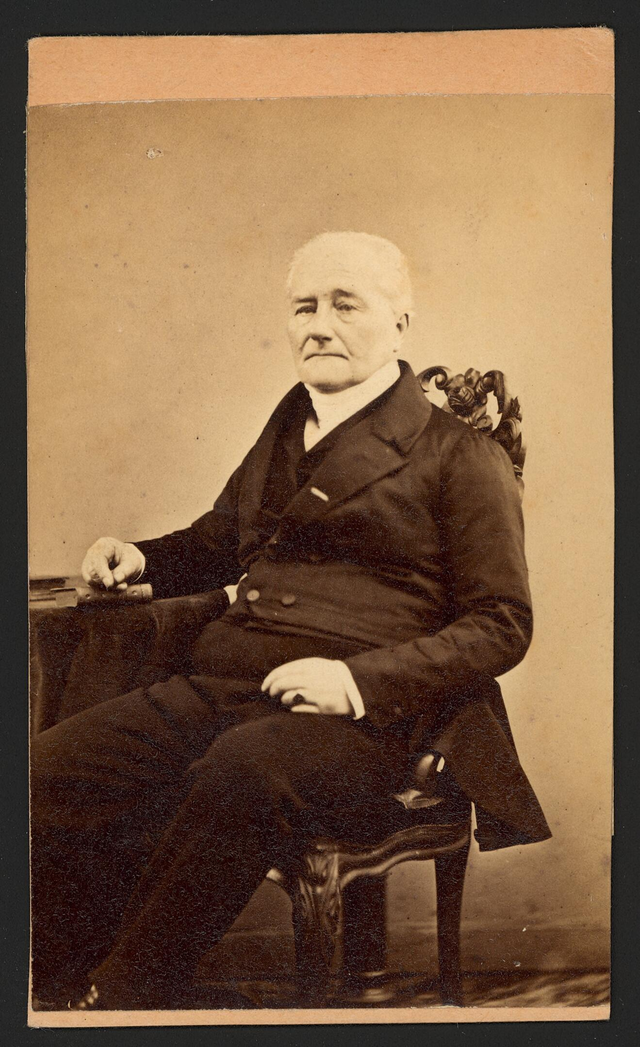 portret van de president van de arrondissementsrechtbank van Den Haag Daniel Jan Bijleveld (1791-1885)